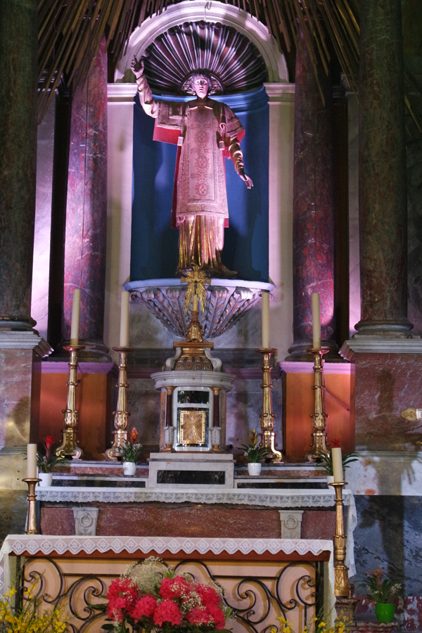 Saint Félix, Saint Patron